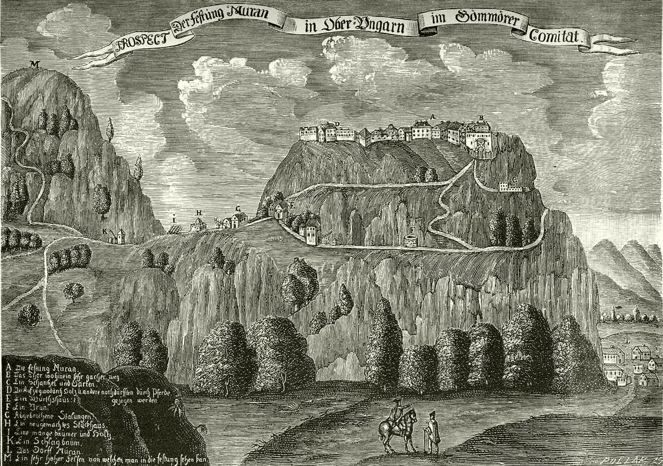 Murány vára a 17.században. Herczeg Koburg Fülöp ő fensége Szent-Antali kastélyában levő régi festmény után metszette Pollák. Fametszet.